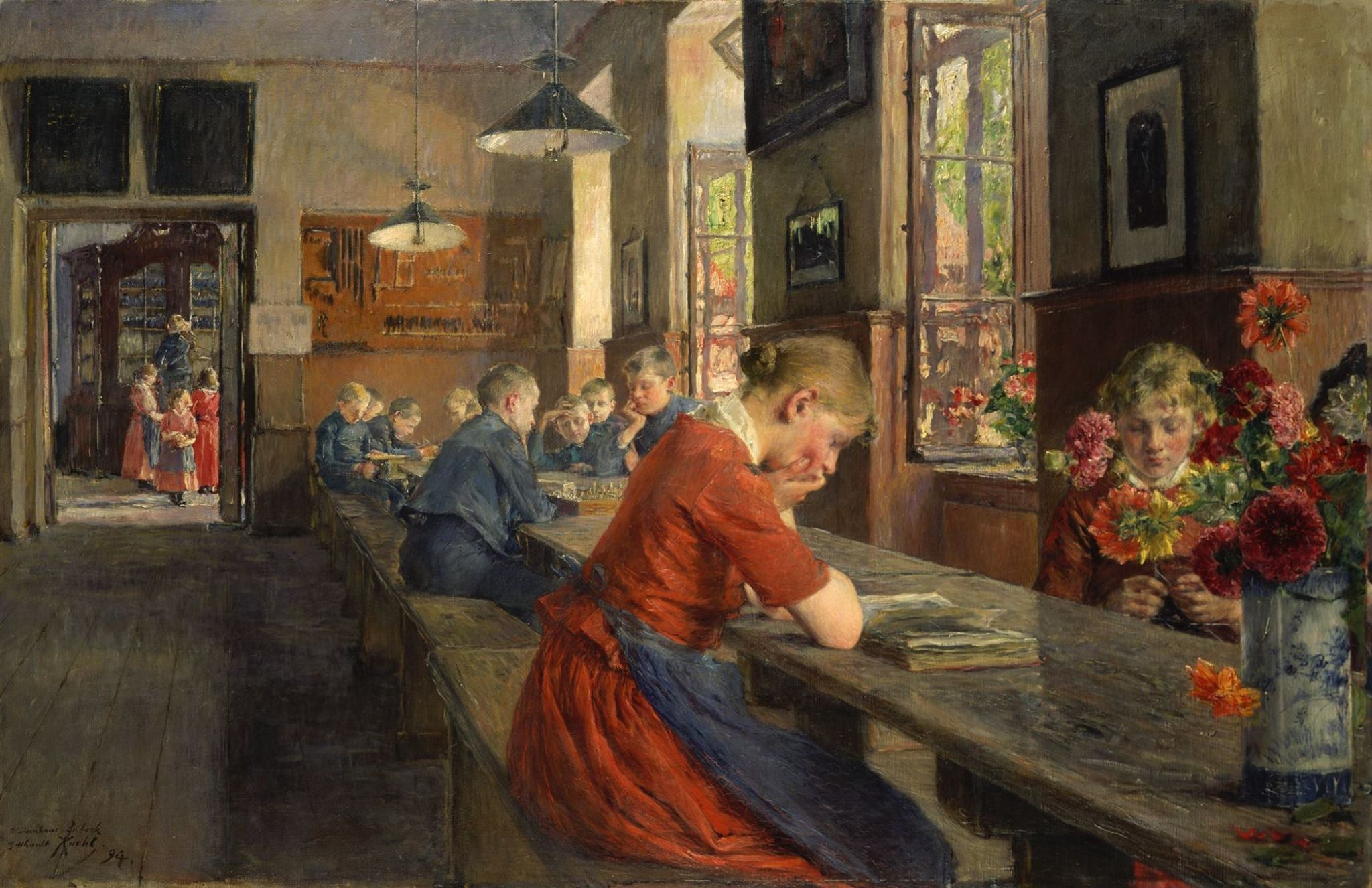 Lübecker Waisenhaus, Öl auf Leinwand; 87 x 131 cm; Museum für Kunst und Kulturgeschichte, Lübeck